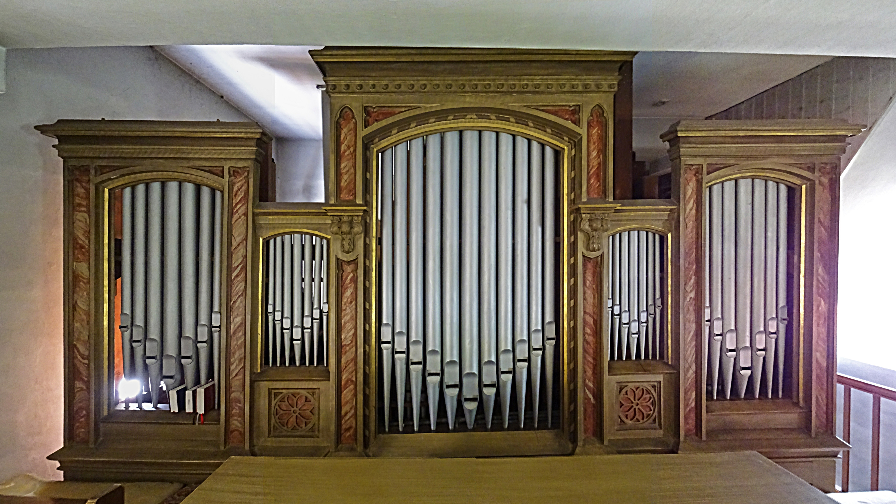 Orgel von Louis Krell (1883 IIP/15) in der Dorfkirche St. Nikolaus (Neuendorf)